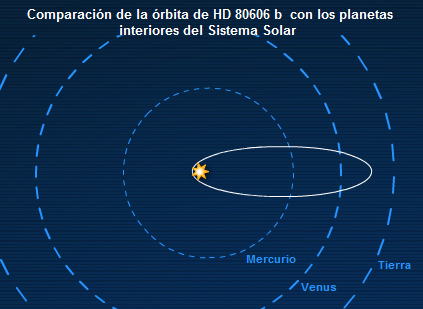 Comparación de la órbita del planeta extrasolar HD 80606 b con la de los planetas interiores del Sistema Solar. Se trata de un exoplaneta con una excentricidad muy elevada (cercana a la unidad). Forma parte de los llamados Júpiter excéntricos.